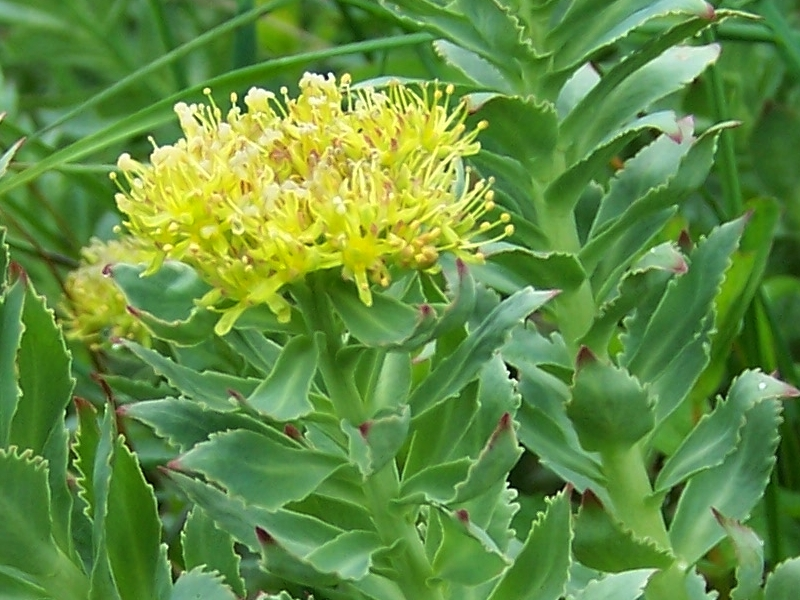 Rhodiola rosea (pl. różeniec górski), habitat: Tatra Mountains, Dolina Tomanowa